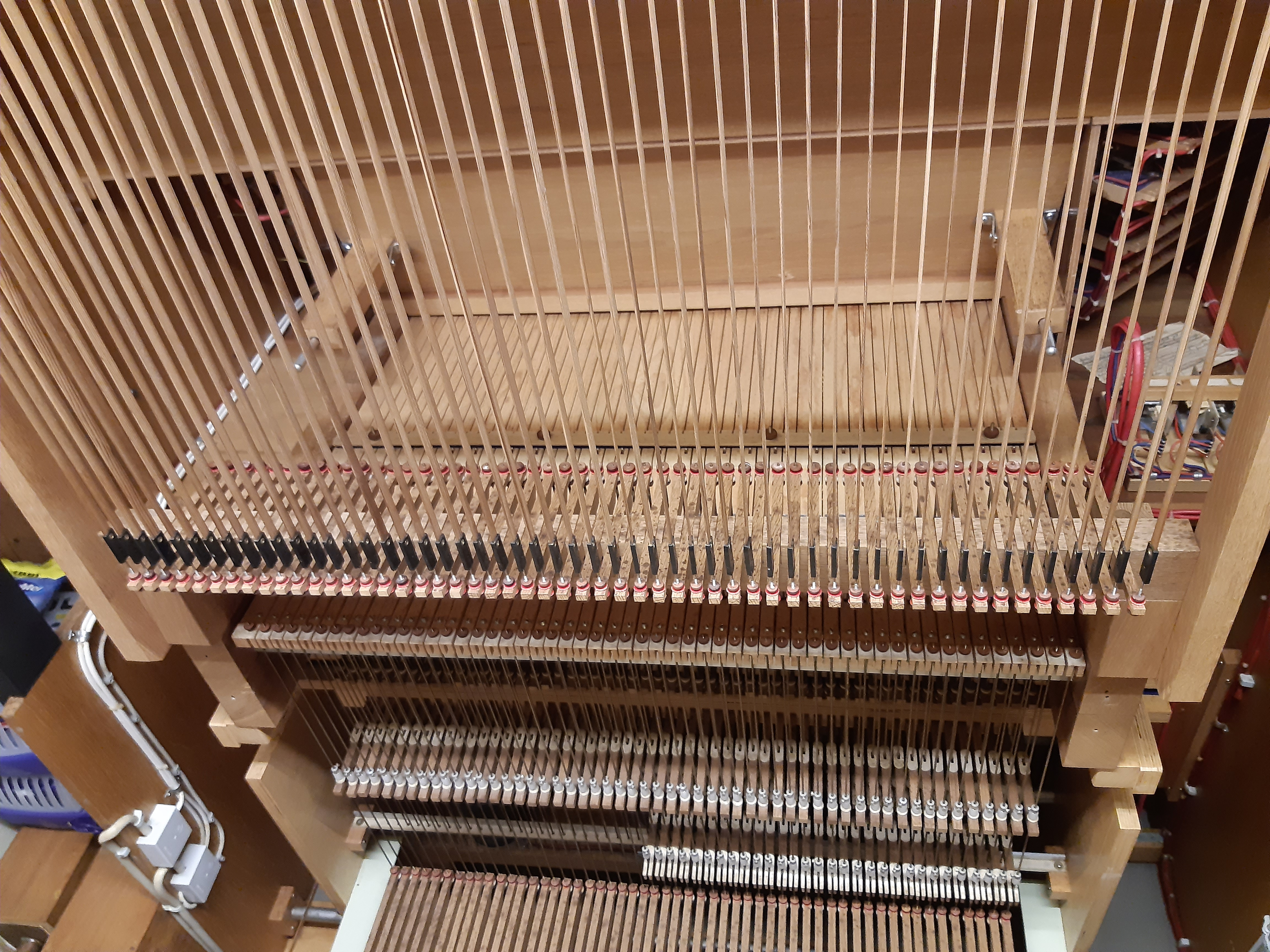 Ansicht der mechanischen Spieltraktur direkt hinter dem Spieltisch.